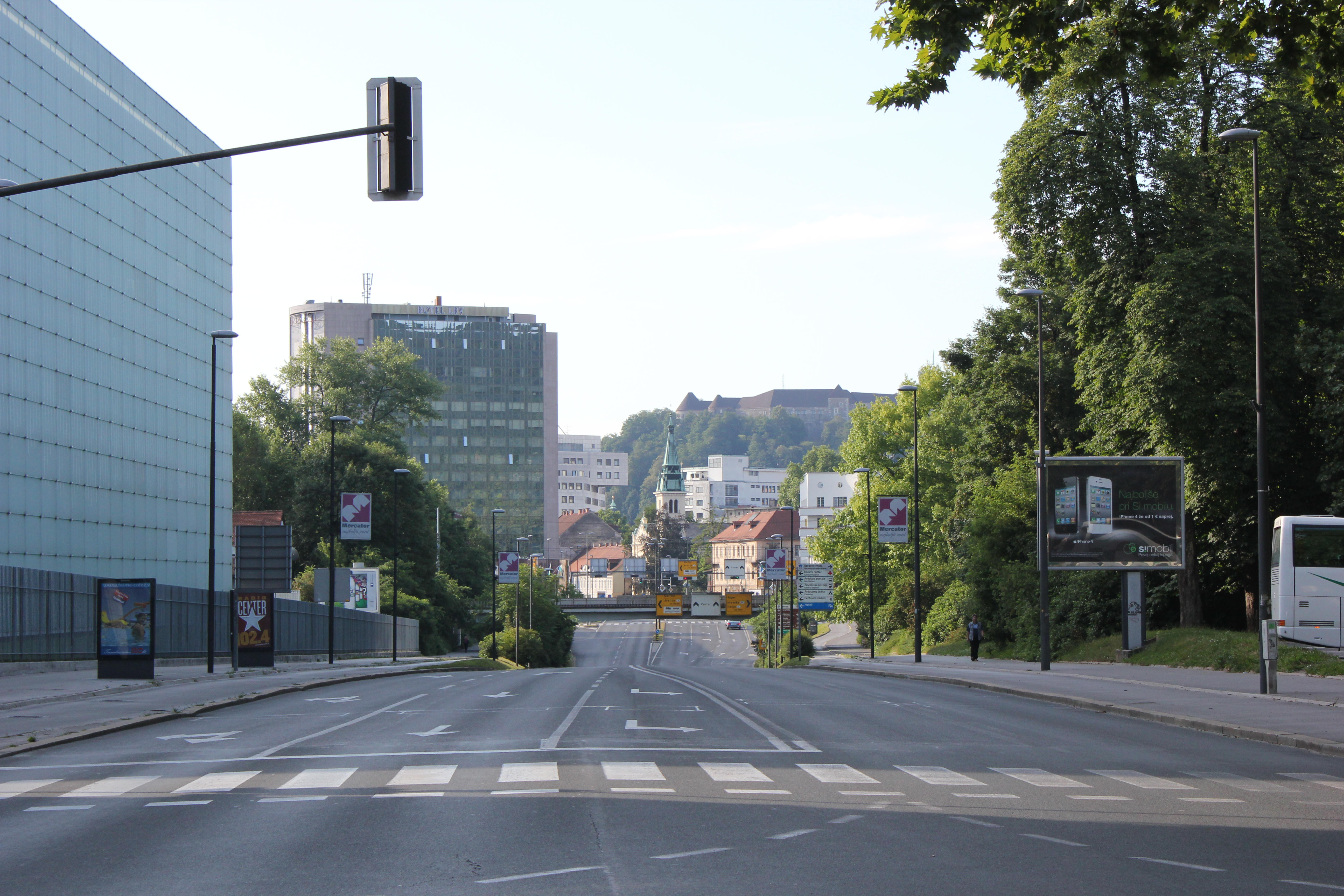 Celovška street in Tivoli